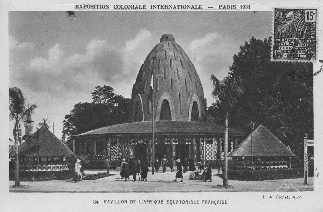 pavillon de l'AEF à l'Exposition COloniale de Paris en 1931